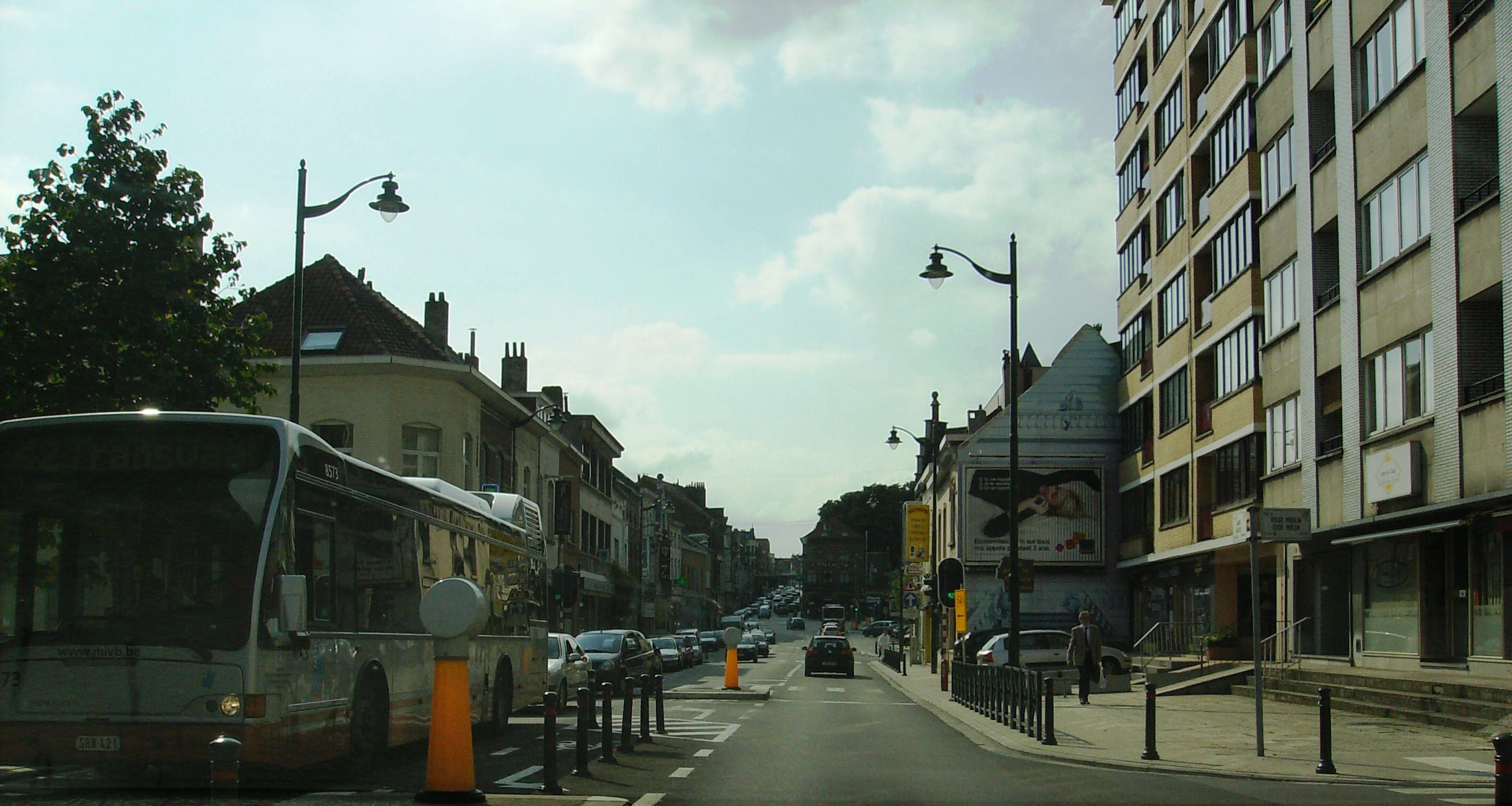 chaussée de Wavre AUderghem Centre Belgium